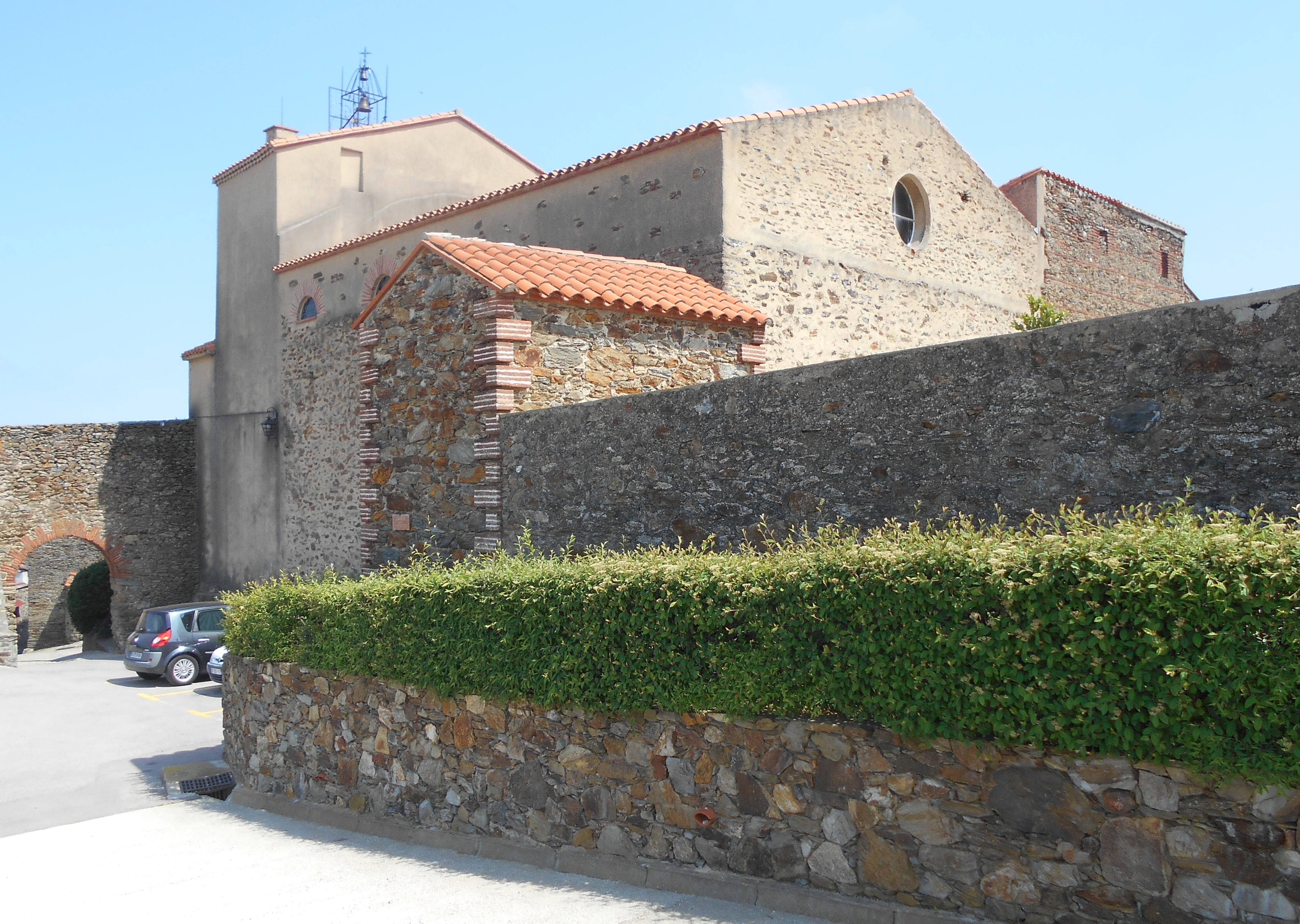 L'església de Sant Marçal